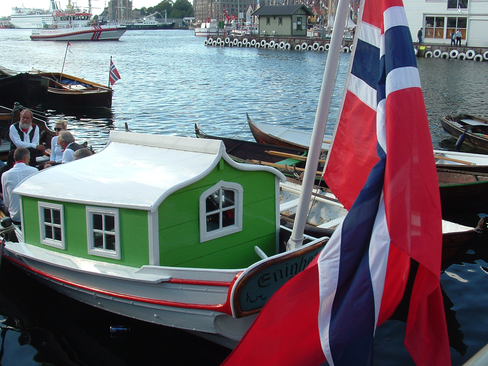 Vengebåten Enigheden Bergen Havn 2008